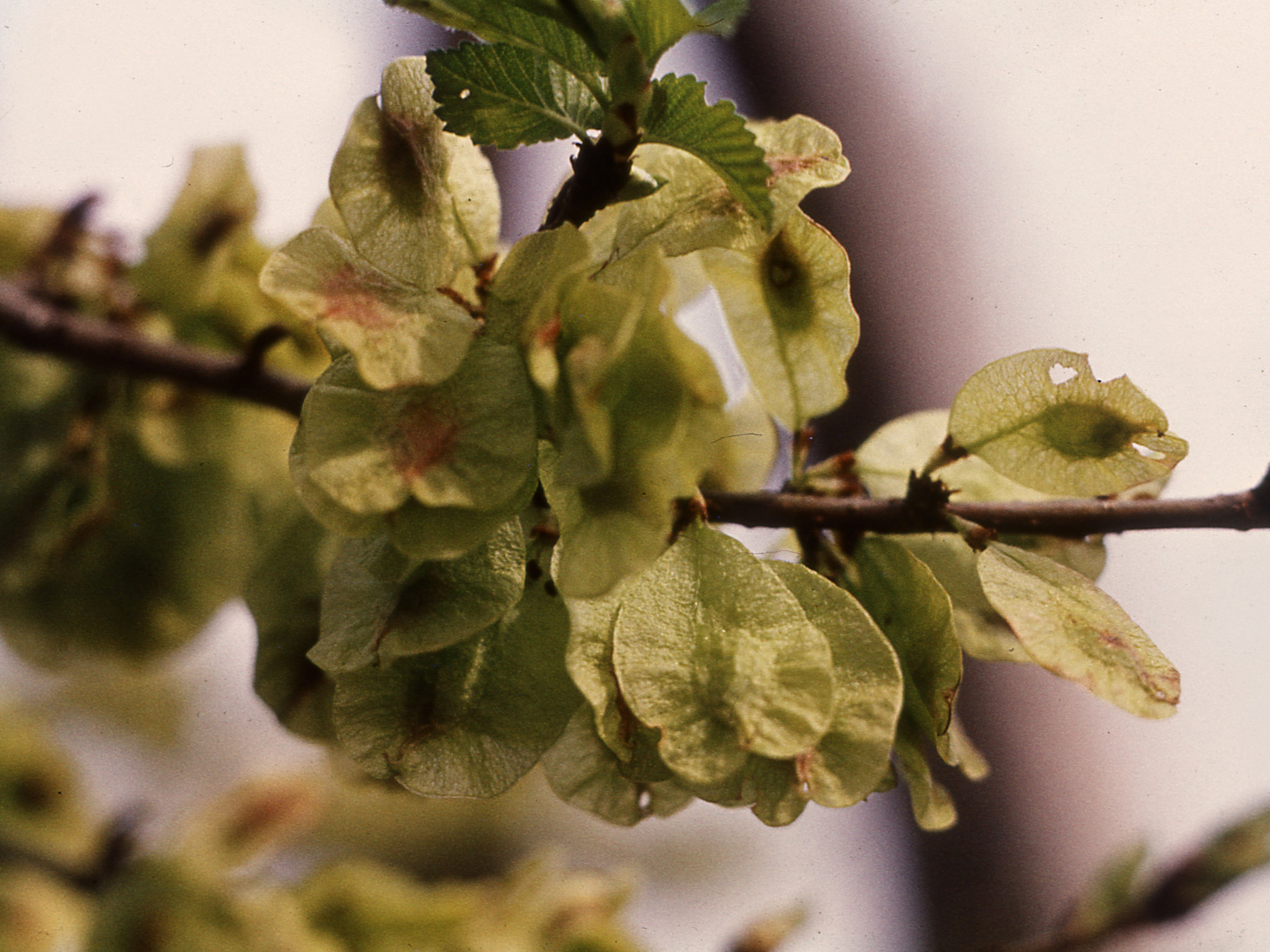 Ulmus carpinifolia samara (photo: Mihailo Grbić)